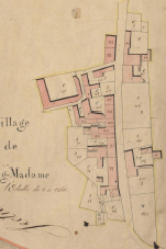 La Guingueta d'Ix en el Cadastre Napoleònic del 1812 (Arxius Departamentals dels Pirineus Orientals)